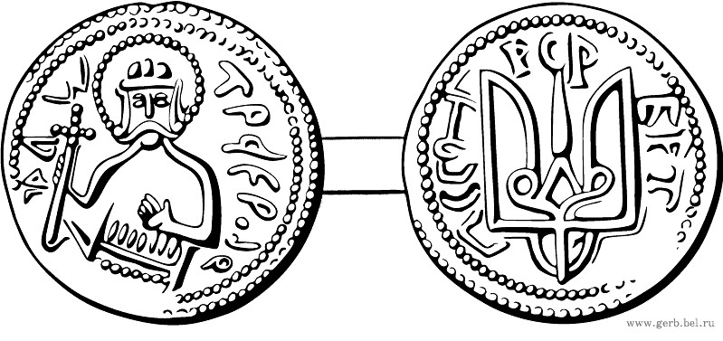 Сребреник Владимира Святославича